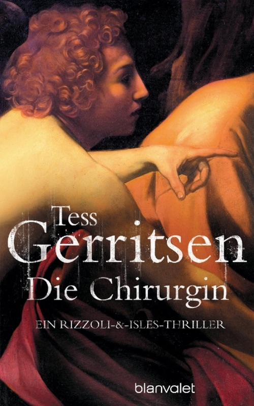 Tess Gerritsen: Die Chirurgin. Blanvalet, München 2004. DNB